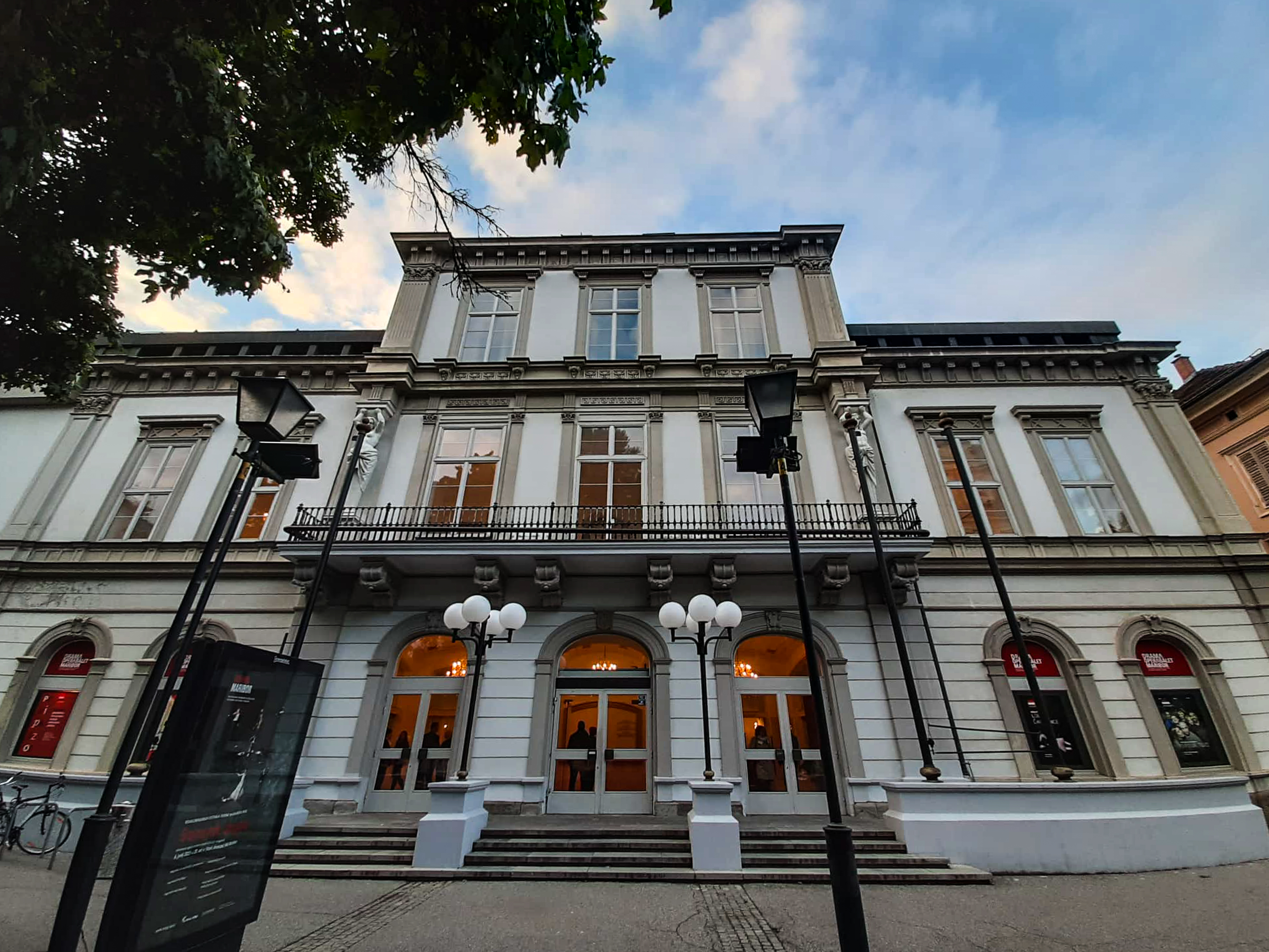 Slovensko narodno gledališče Maribor - Slovenija - Slovenia